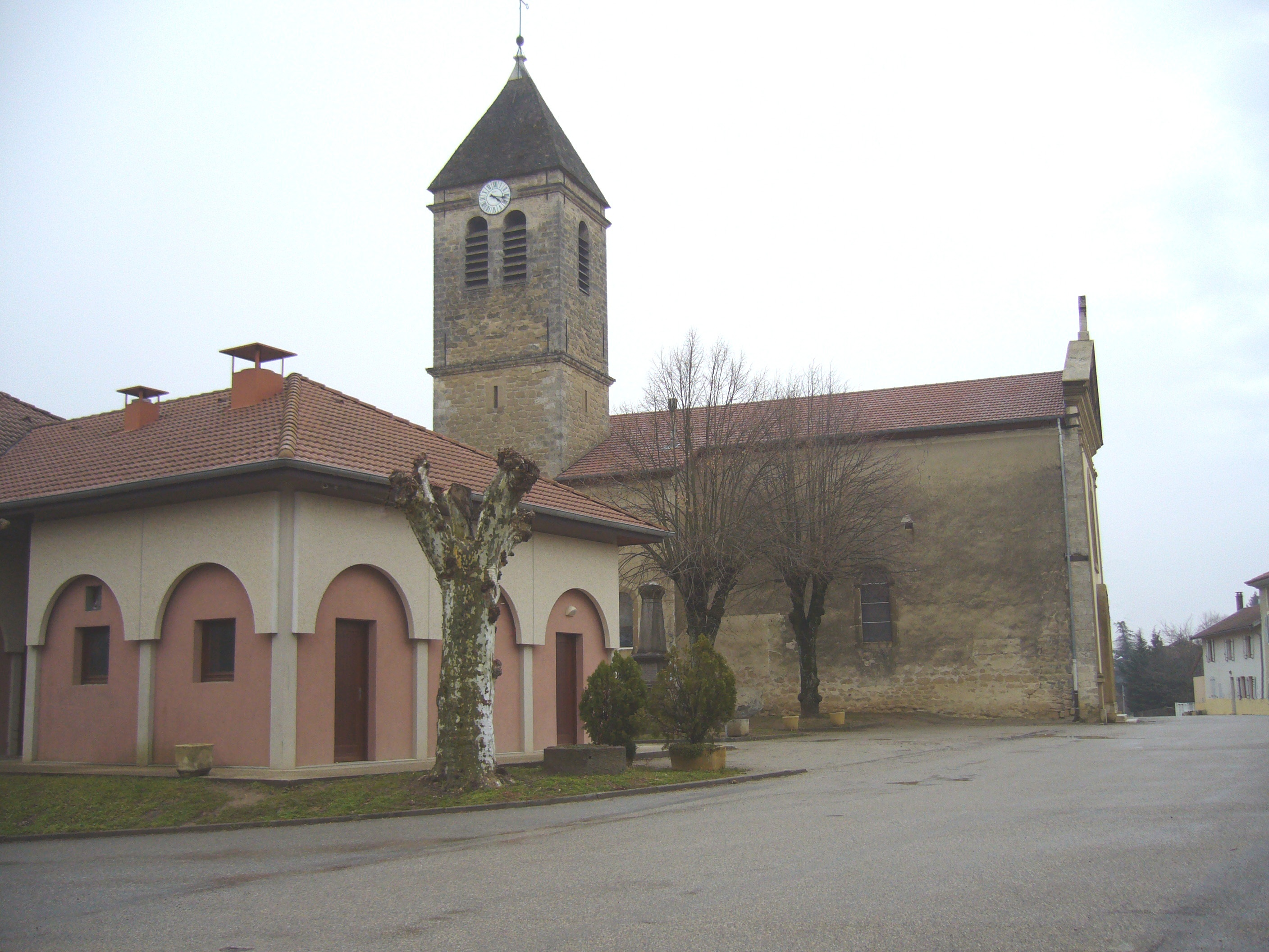 Saint Bonnet de Chavagne (Isère) vue du village avec l'église et la Salle des Fêtes Photo prise par DE